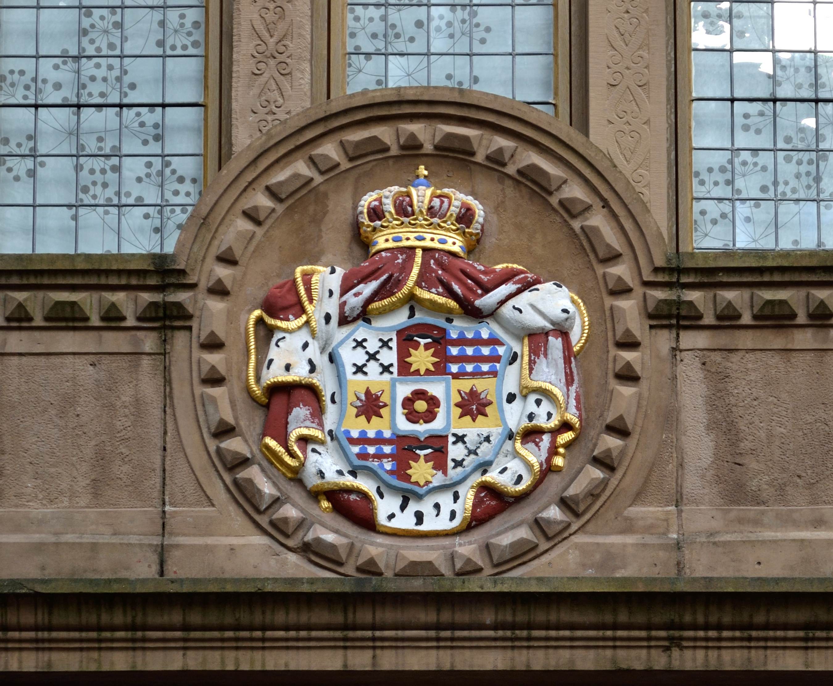 This is a photograph of an architectural monument. Steinernes Giebelhaus mit Renaissance-Fassade